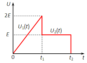 Пример составного входного сигнала